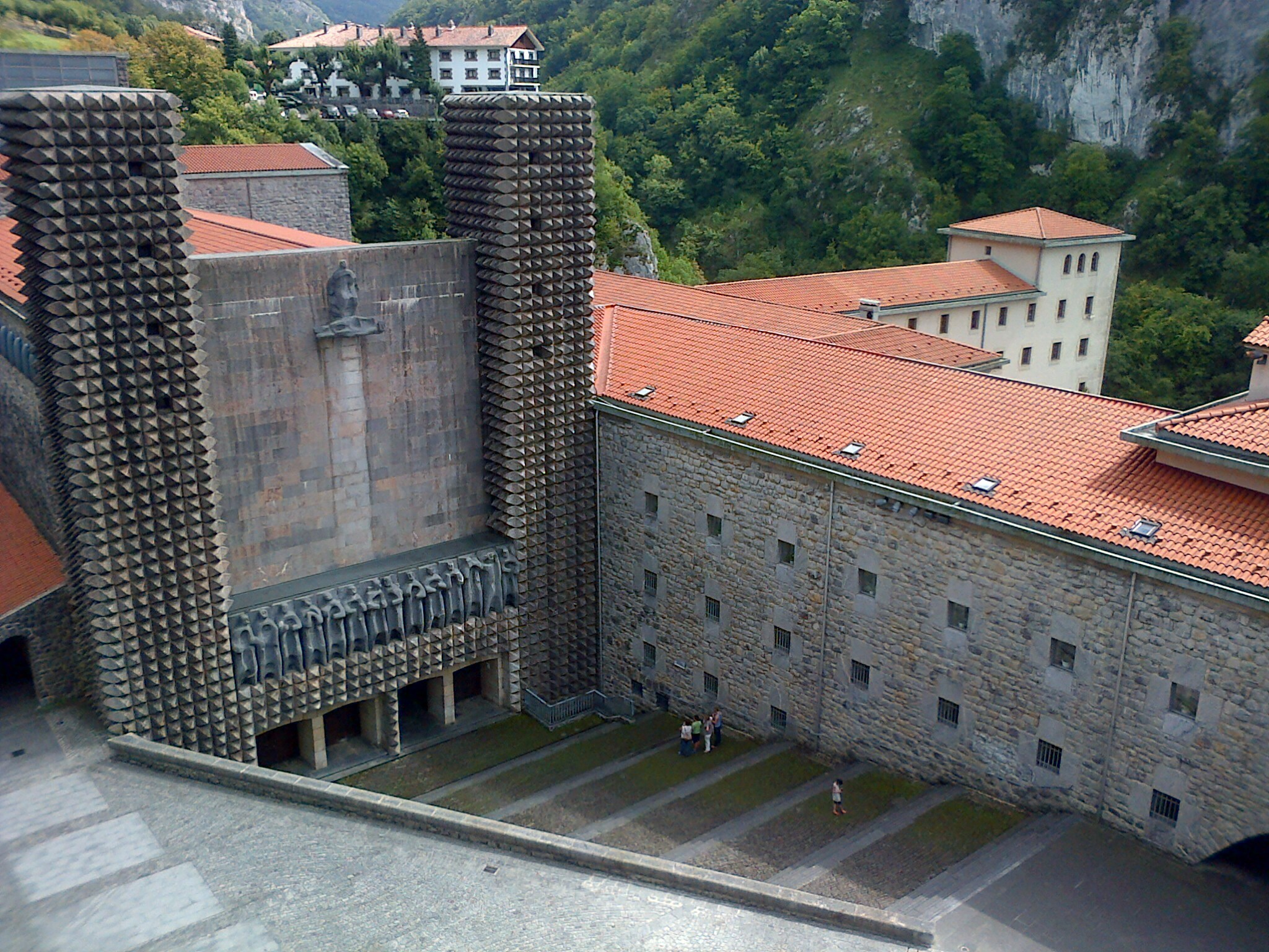 Entrada al santuari d'Arantzazu, amb la Mare de Déu d'Arantzazu, trobada el 1468 pel pastor Rodrigo de Balzategui. Basílica acabada el 1955.